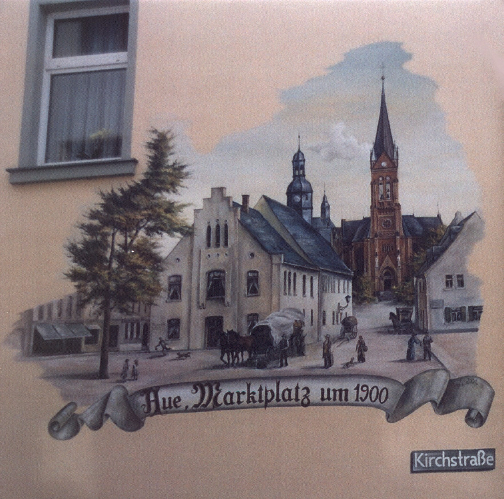 Ansicht des alten Marktes in Aue an einer Giebelwand